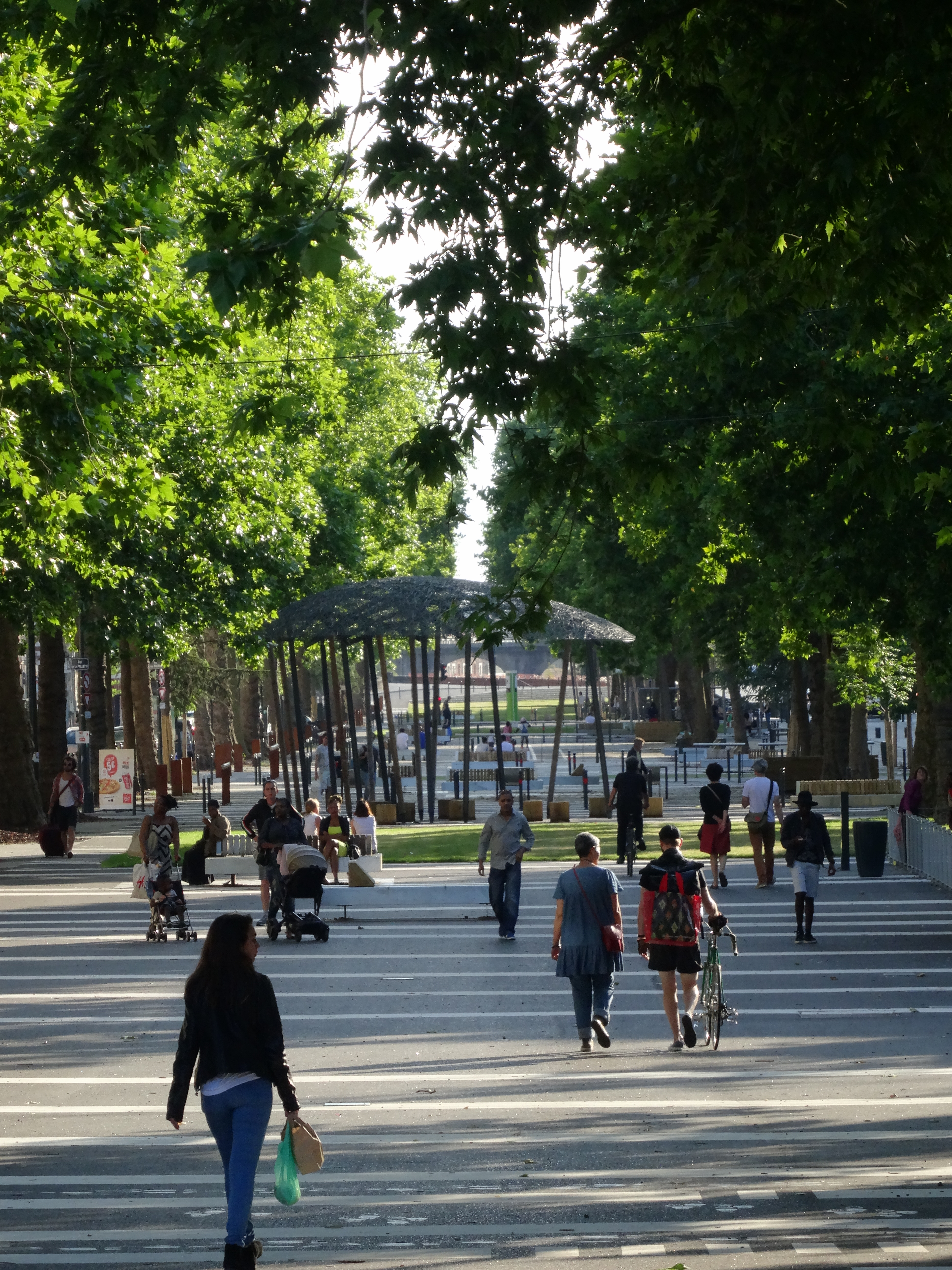 Mail François Mitterand - Rennes